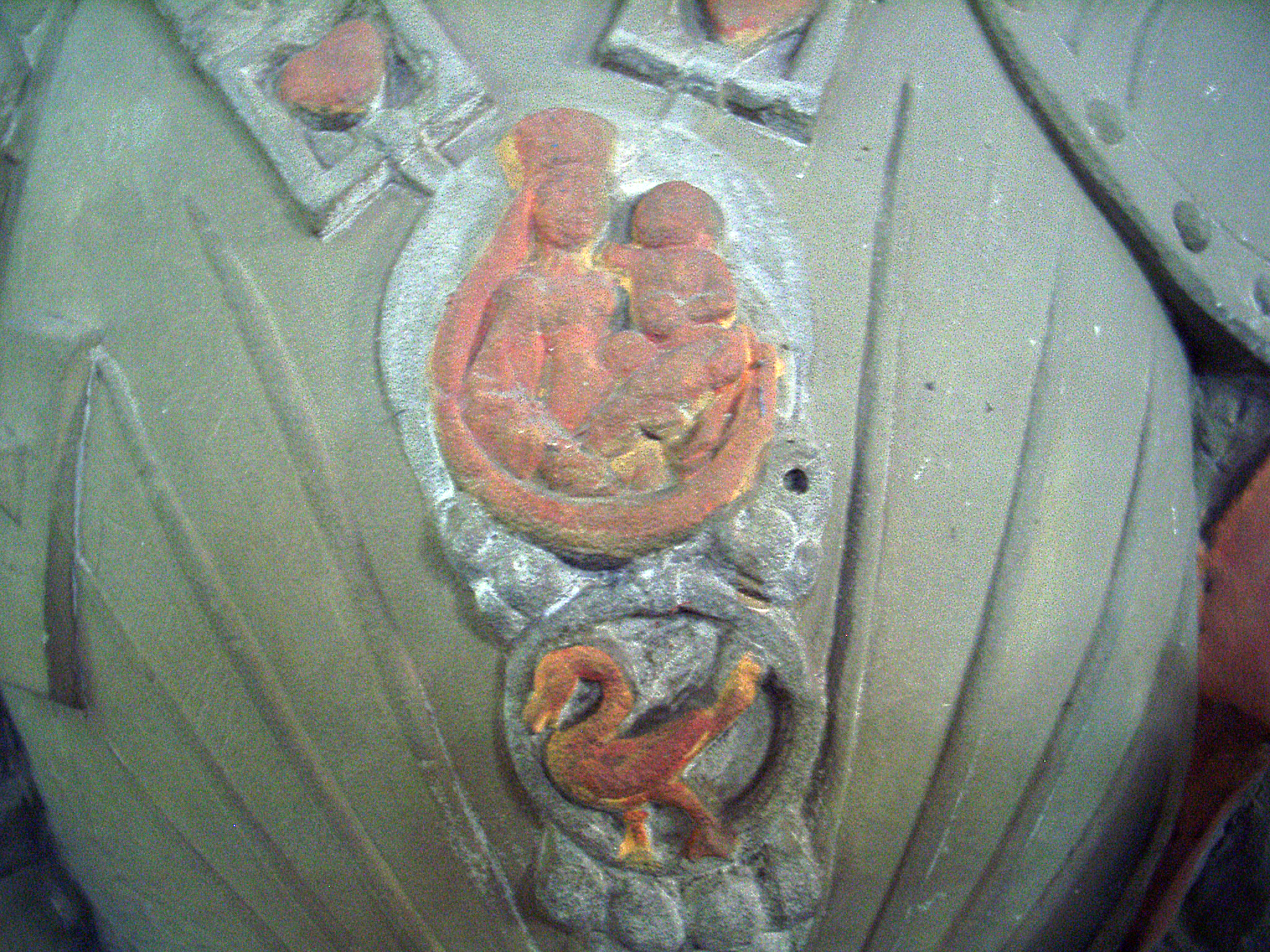 Feuchtwangen, Ritter des Schwanenordens